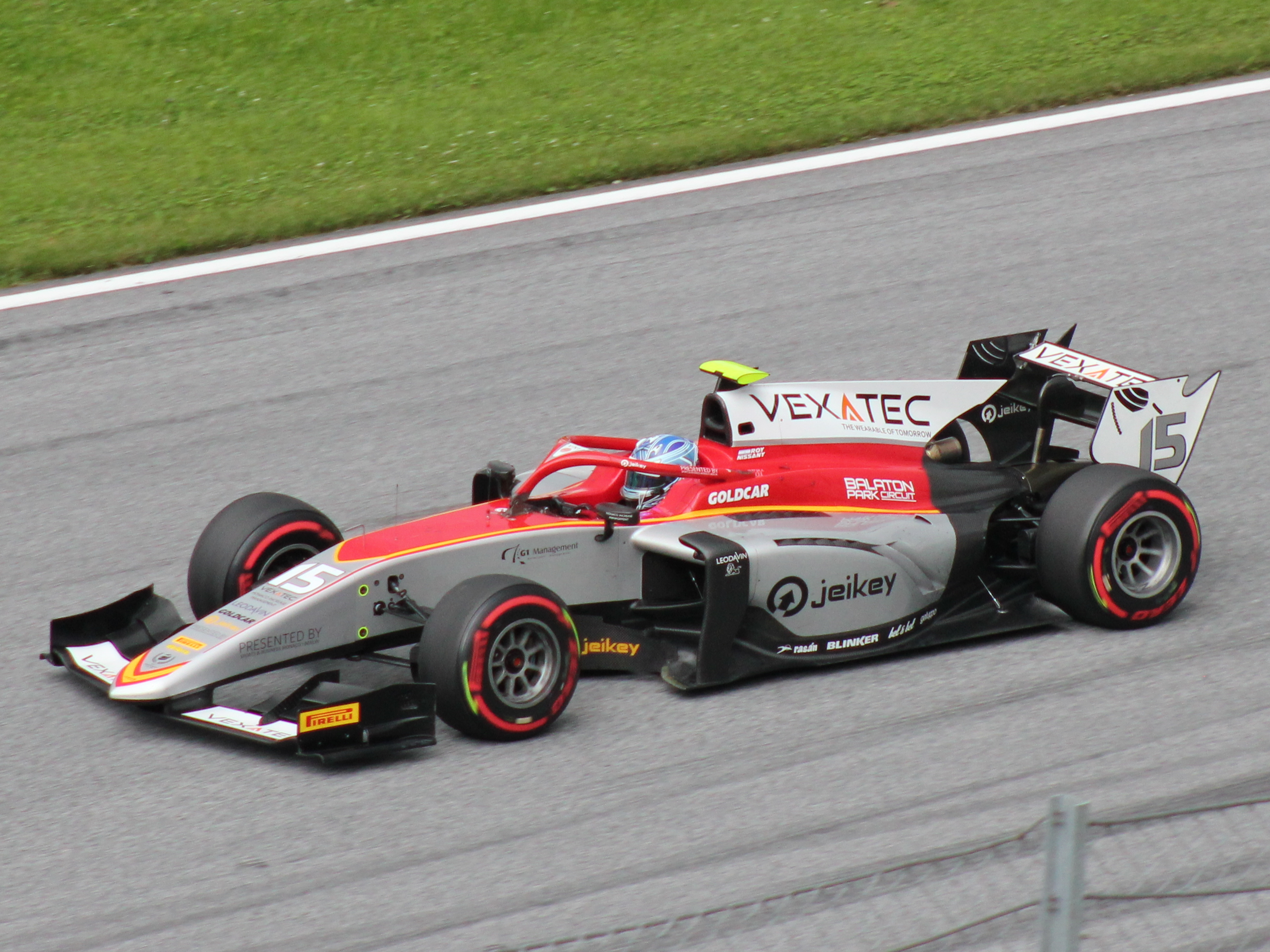 15 Roy Nissany beim Rennwochenende in Österreich 2018 (2)